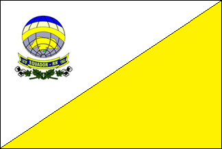 Bandeira de Equador, Rio Grande do Norte, Brasil.